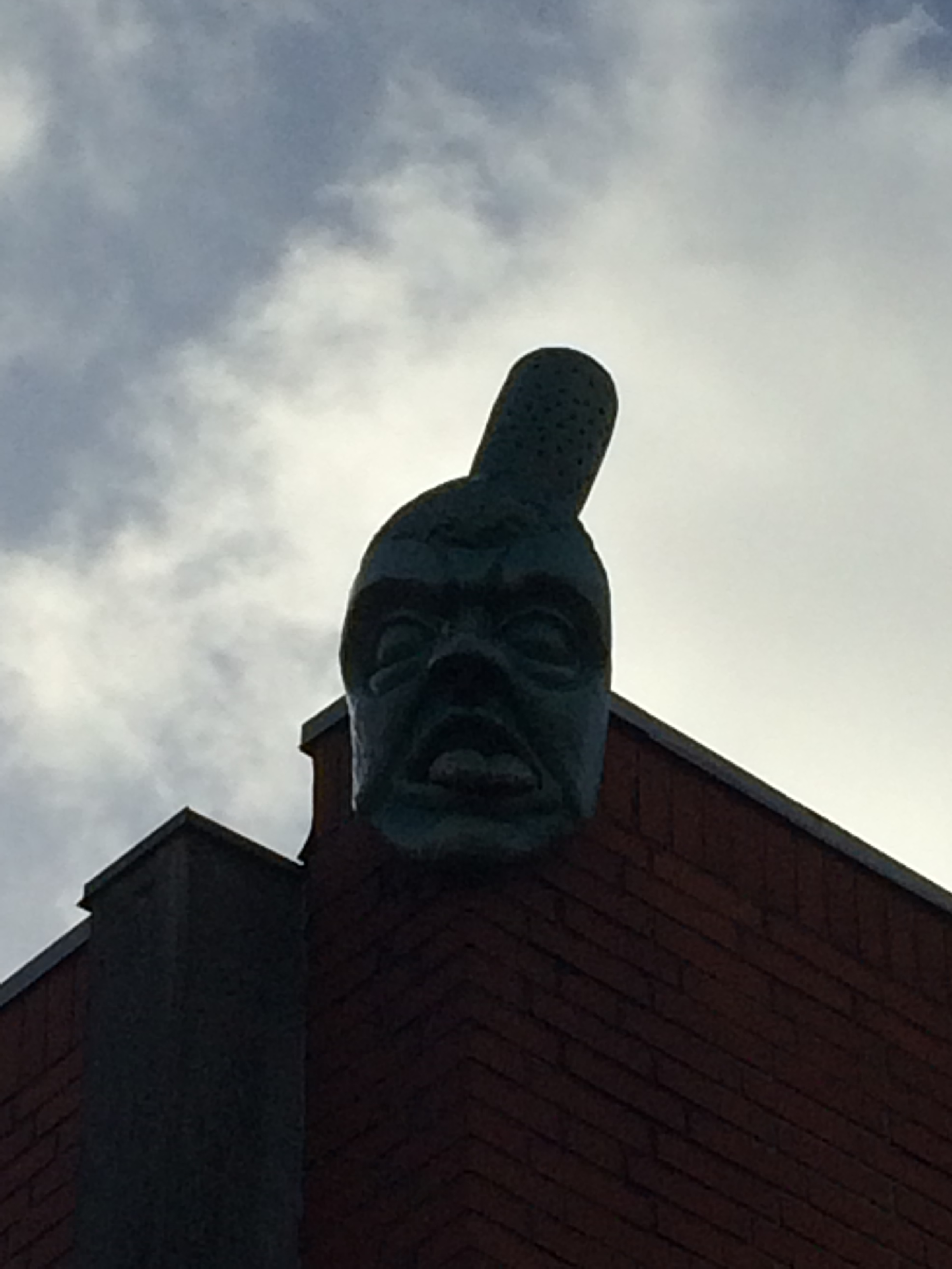 Fantasy head facing northeast on Tallerup school sports gym